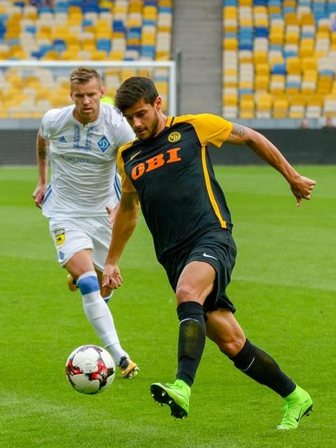 Loris Benito beim CL-Qualifikations-Hinspiel Dynamo Kiew gegen BSC Young Boys